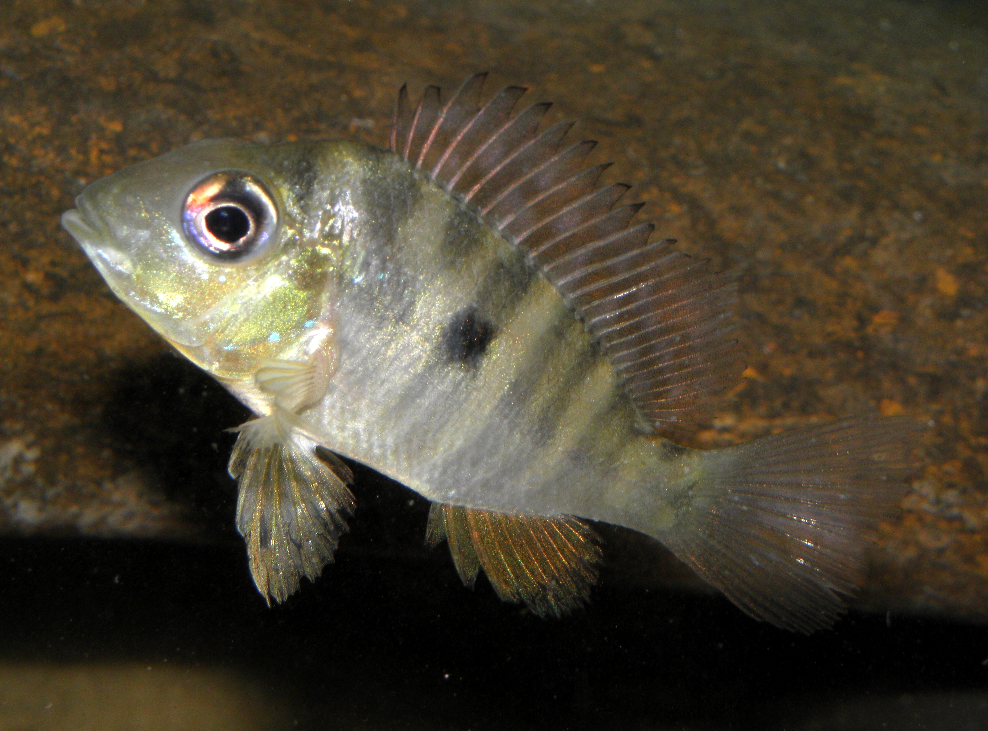 Gymnogeophagus balzanii.